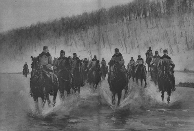 extrait du journal "le miroir".